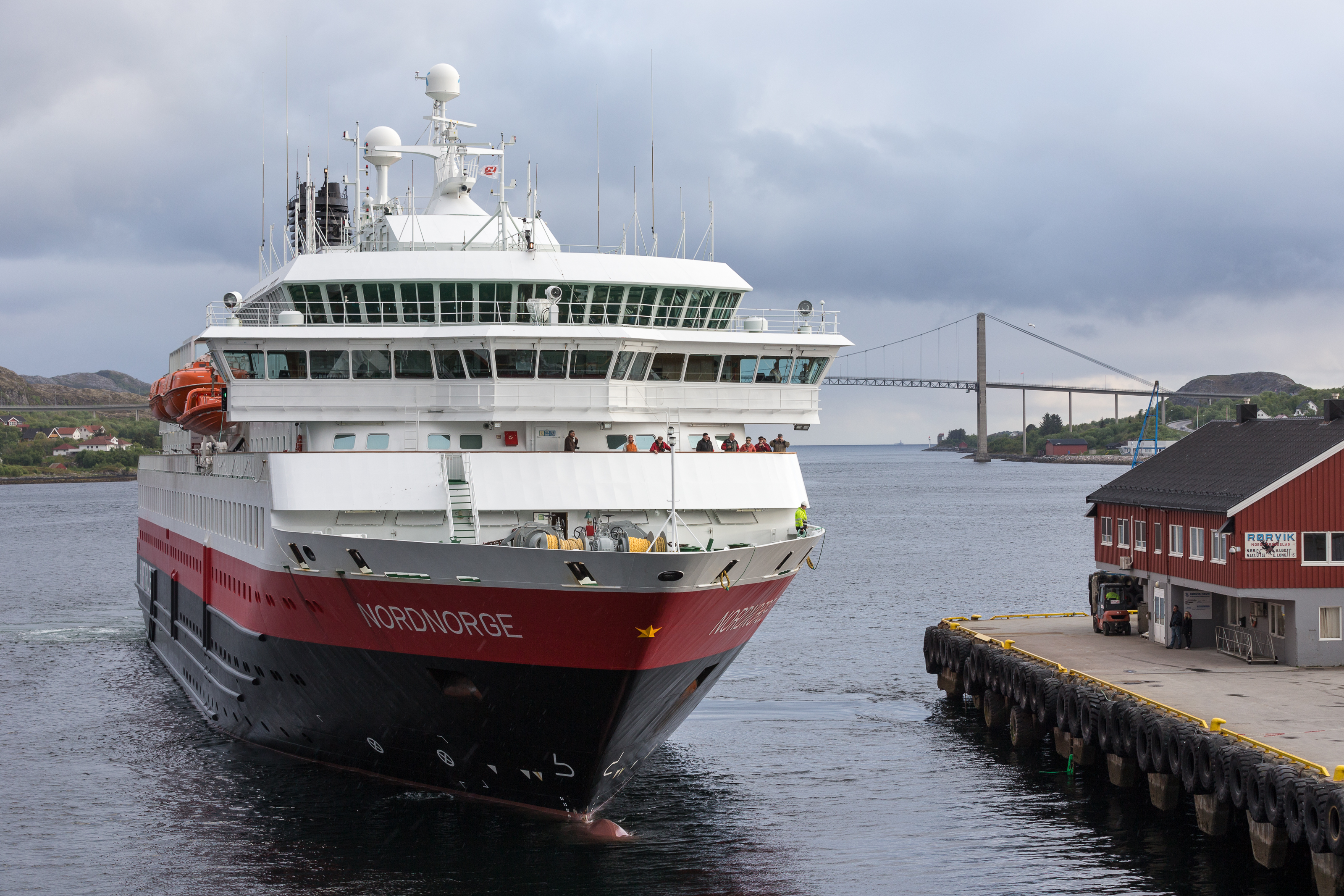 Die nordgehende "Nordnorge" legt in Rørvik an